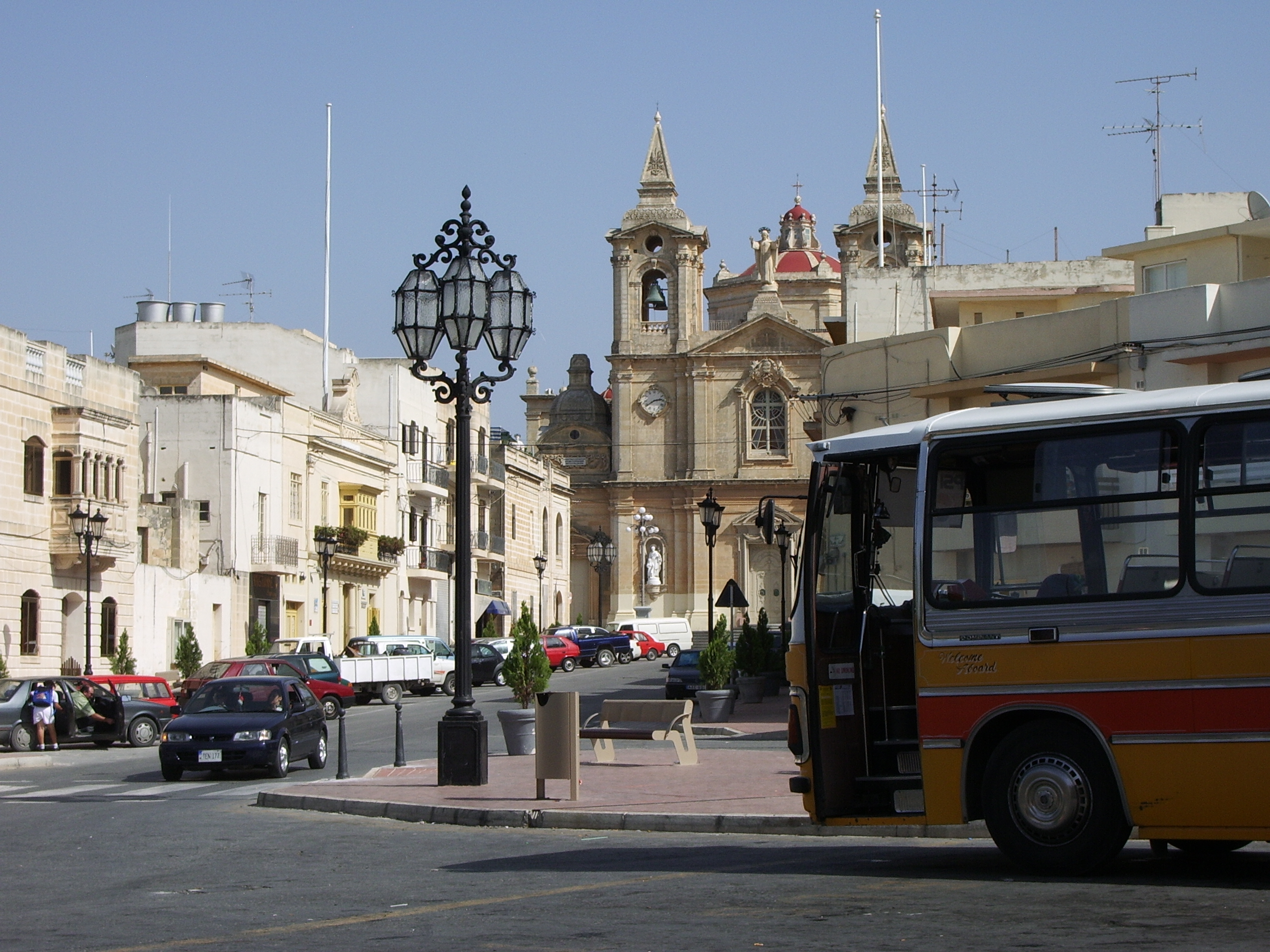 Zurrieq. Cattedrale sullo sfondo